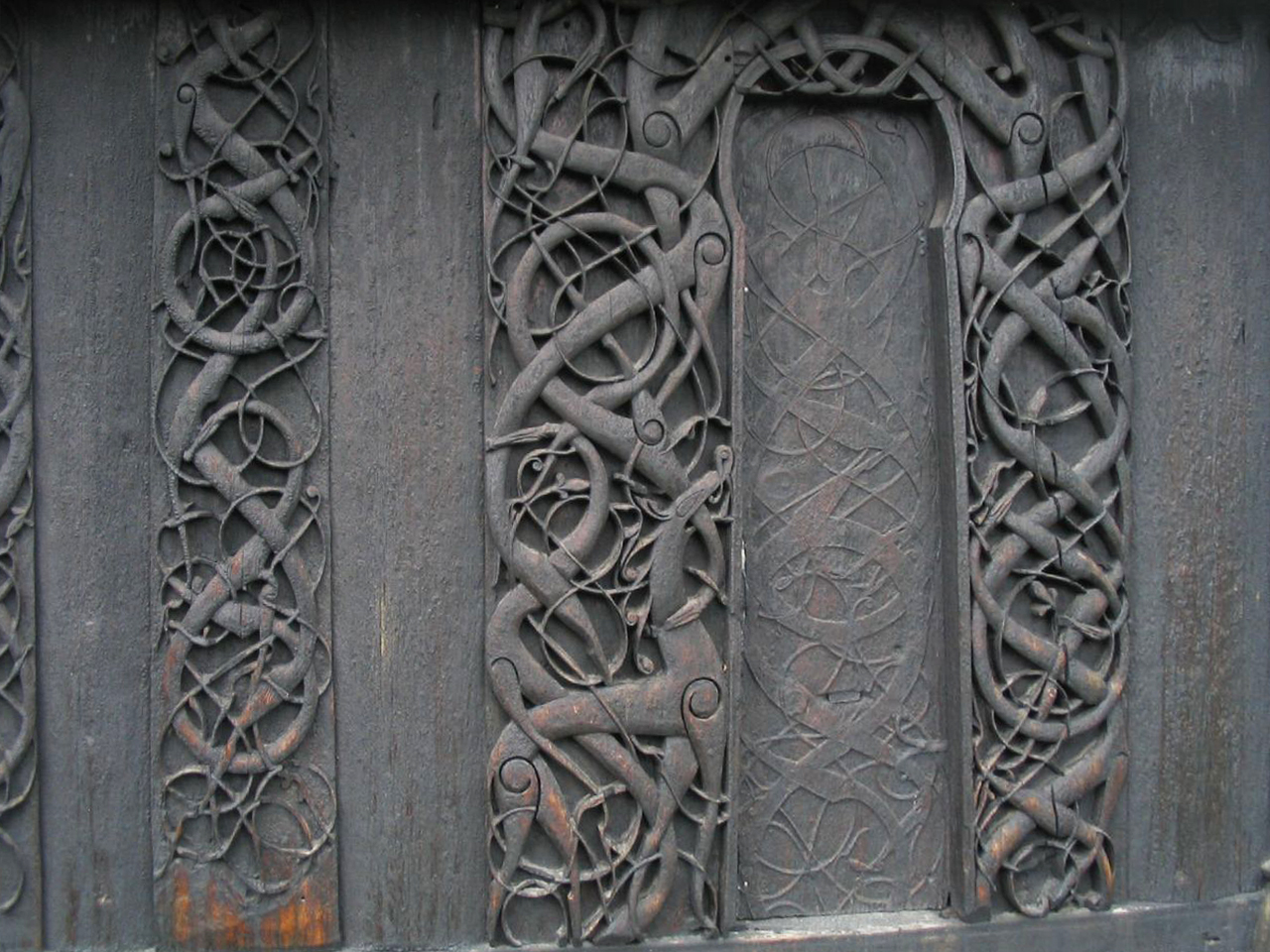 Urnesportalen, Urnes stavkyrkje